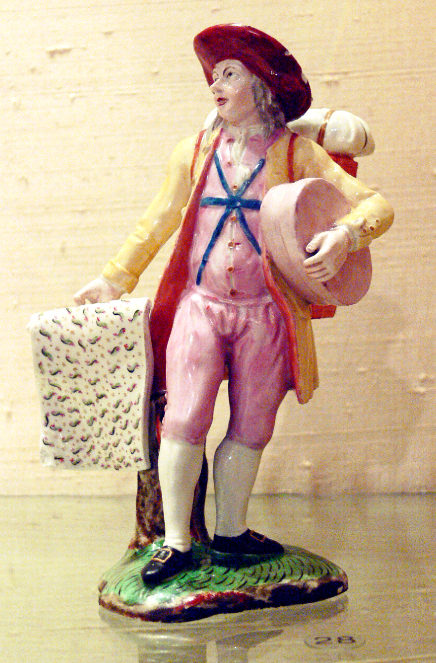 Kurzwarenhändler, Modell: vermutlich Bossierer Höckel, Porzellan/Muffel_Technik, Kelsterbach um 1790 (Marke: HD mit Krone (blau, ligiert)); inspiriert von einem Meißener Modell von Peter Reinicke (1745) Gallery: Reiss-Engelhorn-Museen, Mannheim